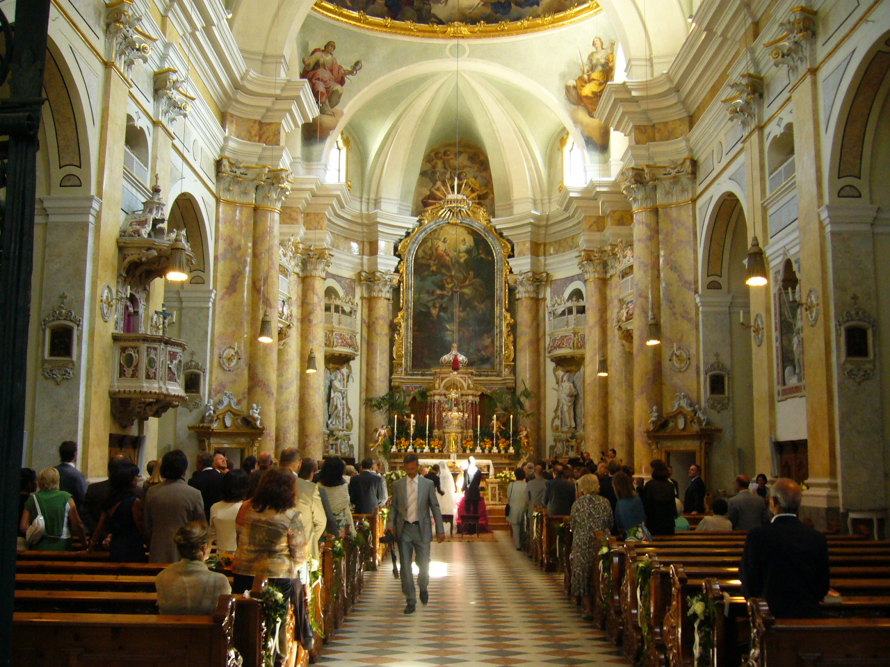 Innenansicht der Klosterkirche Muri Griess in Bozen, Südtirol, Italien